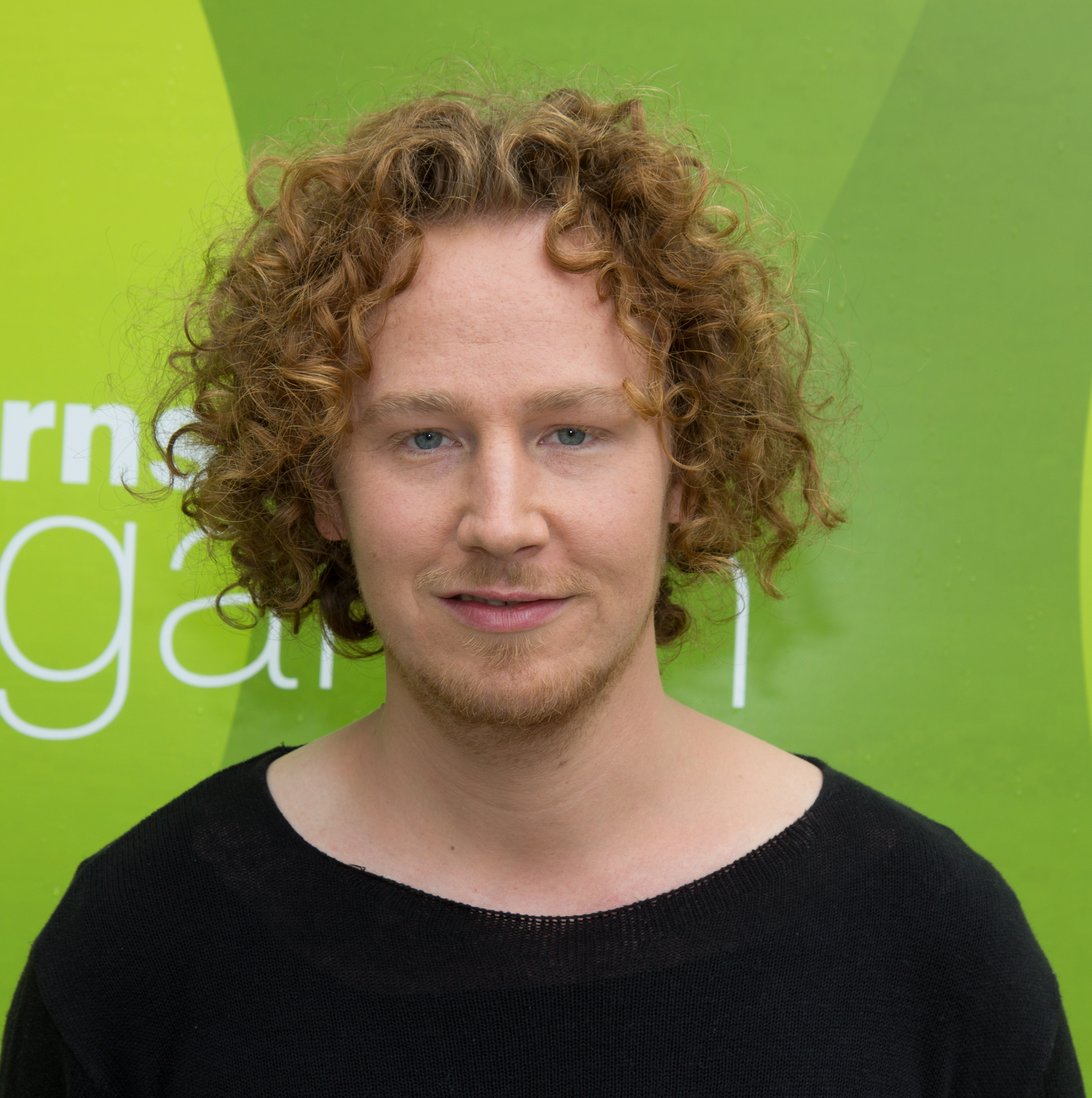 Michael Schulte als Gast beim ZDF-Fernsehgarten am 20. Mai 2018 in Mainz.